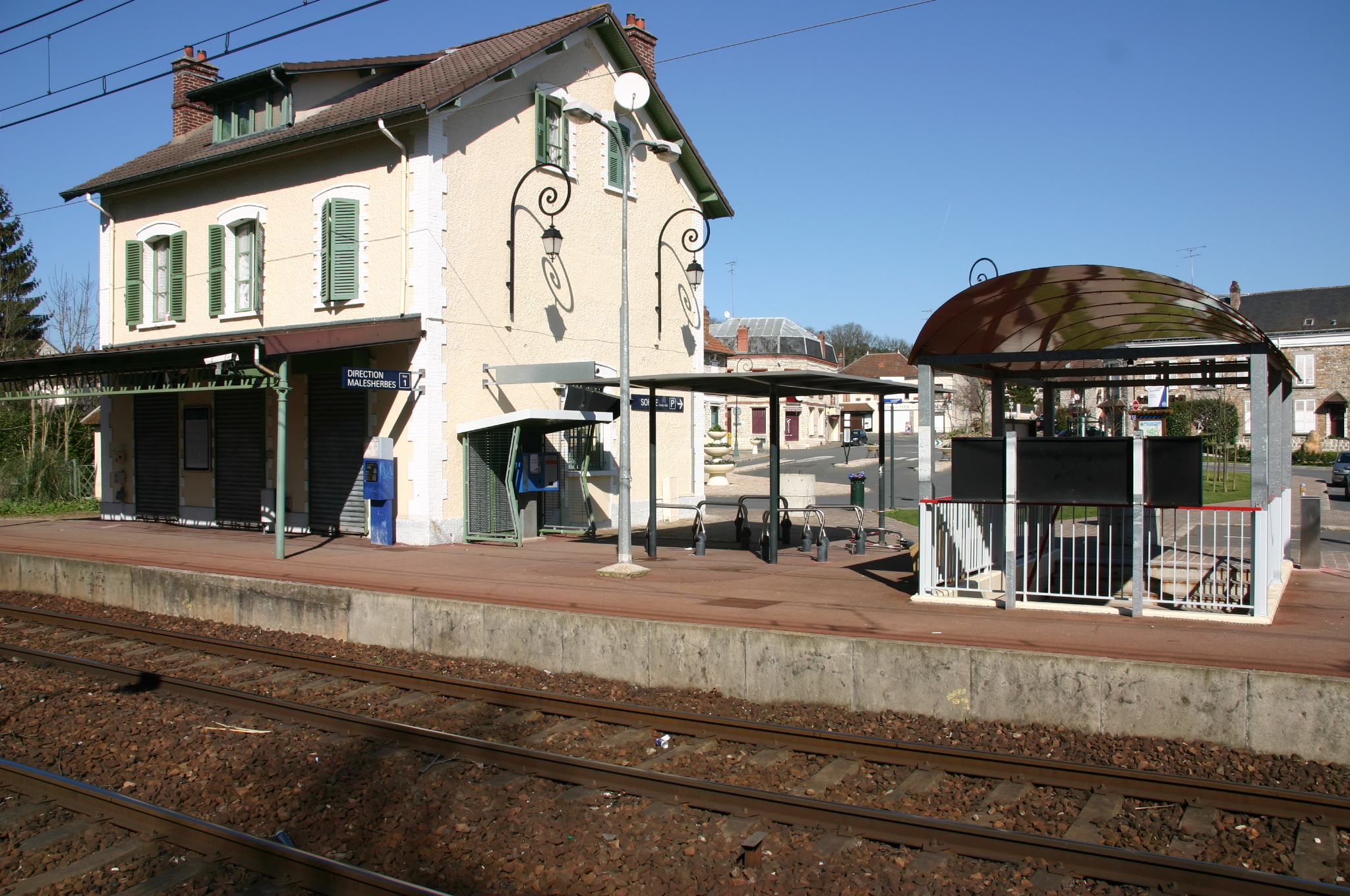 Gare de Boutigny, Boutigny-Sur-Essonne, département de l'Essonne (France)